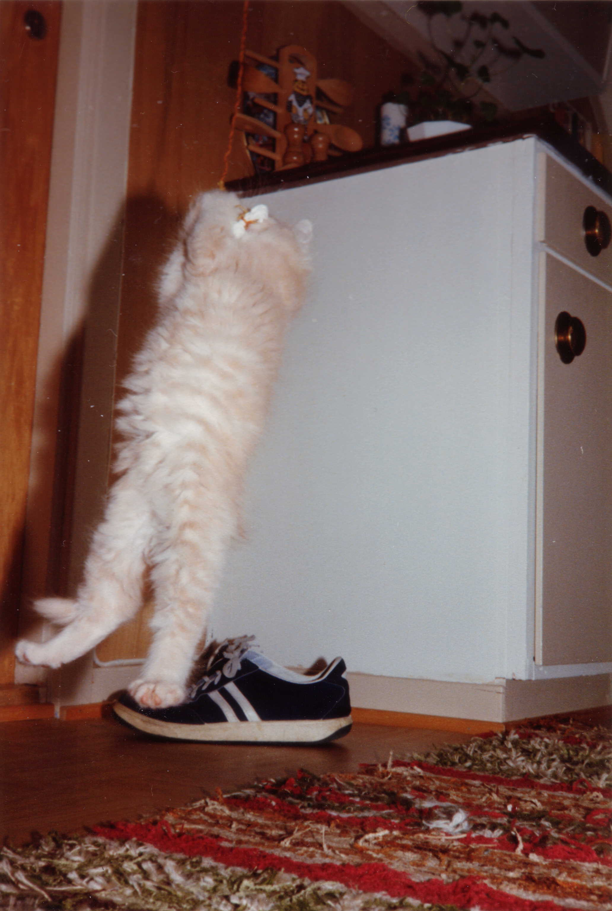 Felis silvestris catus dans un champ gravitationnel (felis silvestris catus in a gravitational field).